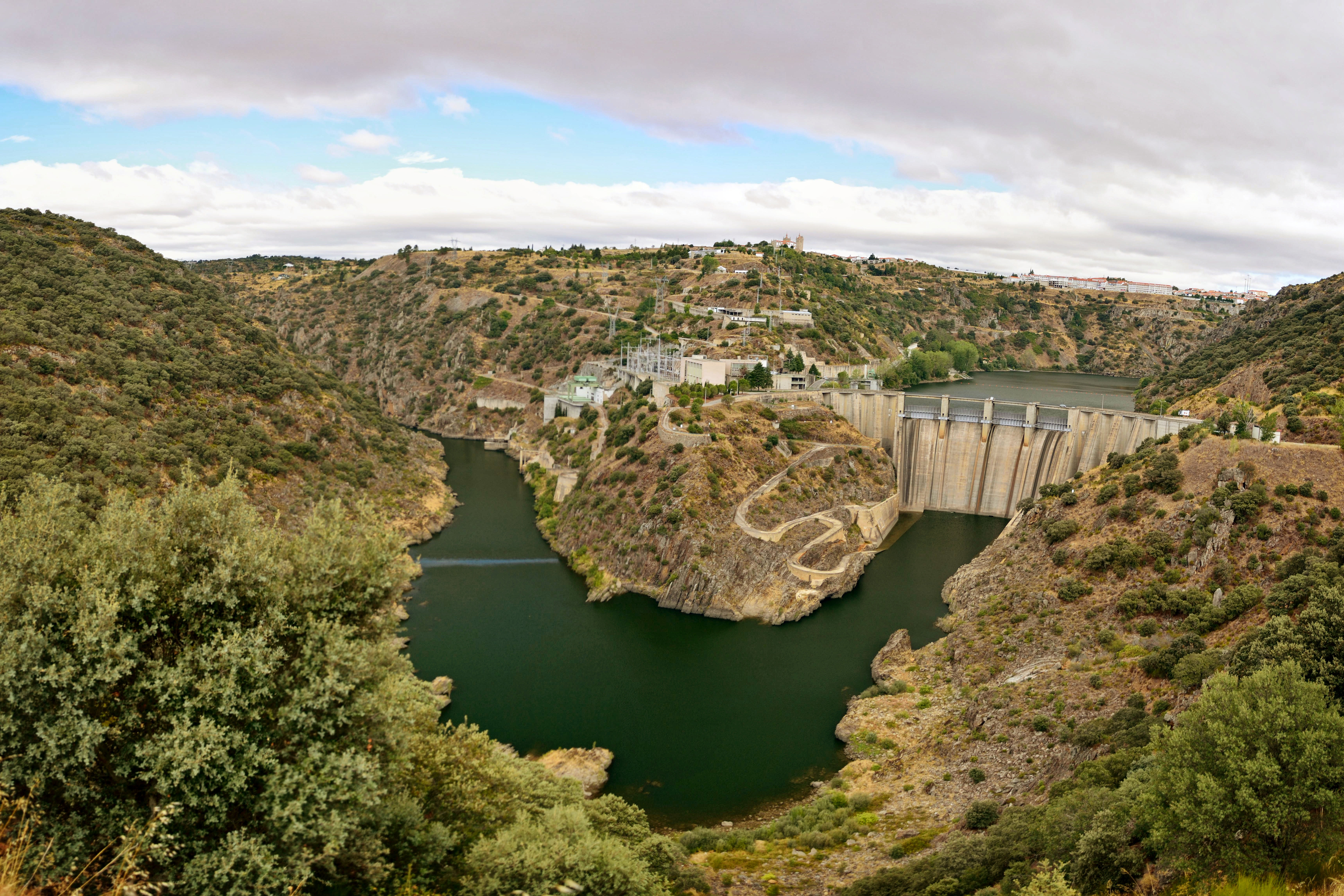 Arribes del Duero. Río Duero en la frontera entre España y Portugal, a la altura de la Presa de Miranda Do Douro, fotografiada desde territorio español. This is a photography of a Special Area of Conservation in Spain with the ID: ES4150096. Natura2000 entry, EEA entry This is a photography of a Site of Community Importance in Portugal with the ID: PTCON0022. Natura2000 entry, EEA entry